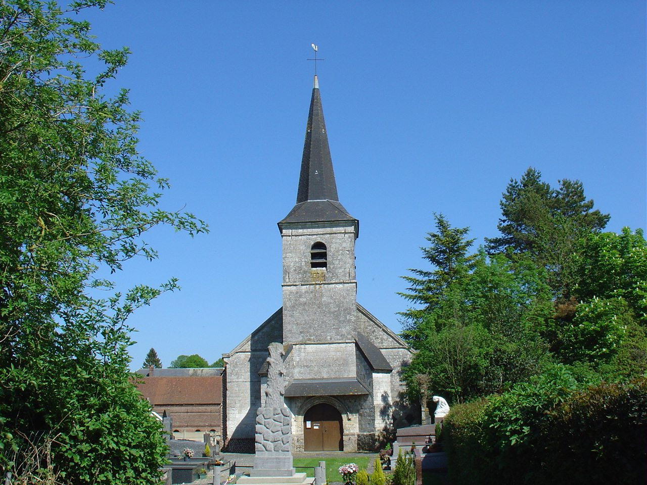 Église d'Herlin-le-Sec